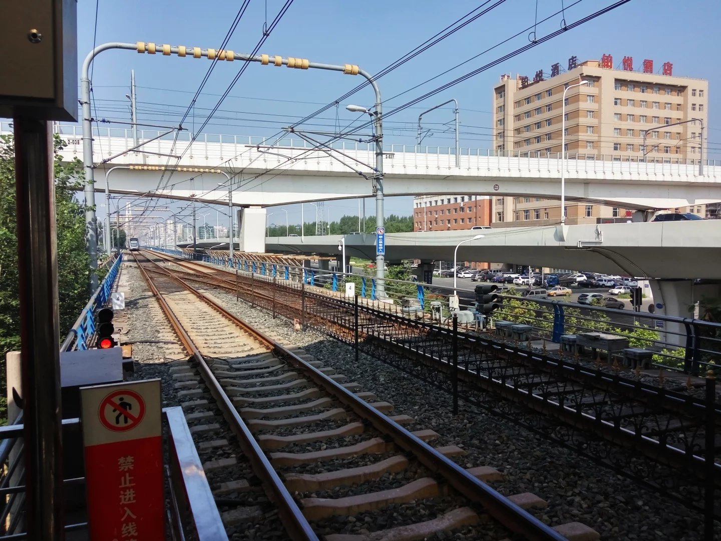 从3号线职业学院站视角看4号线的高架桥